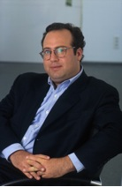 Portrait d'Alex Berger - Photo prise lorsqu'Alex Berger travaillait à Canal +